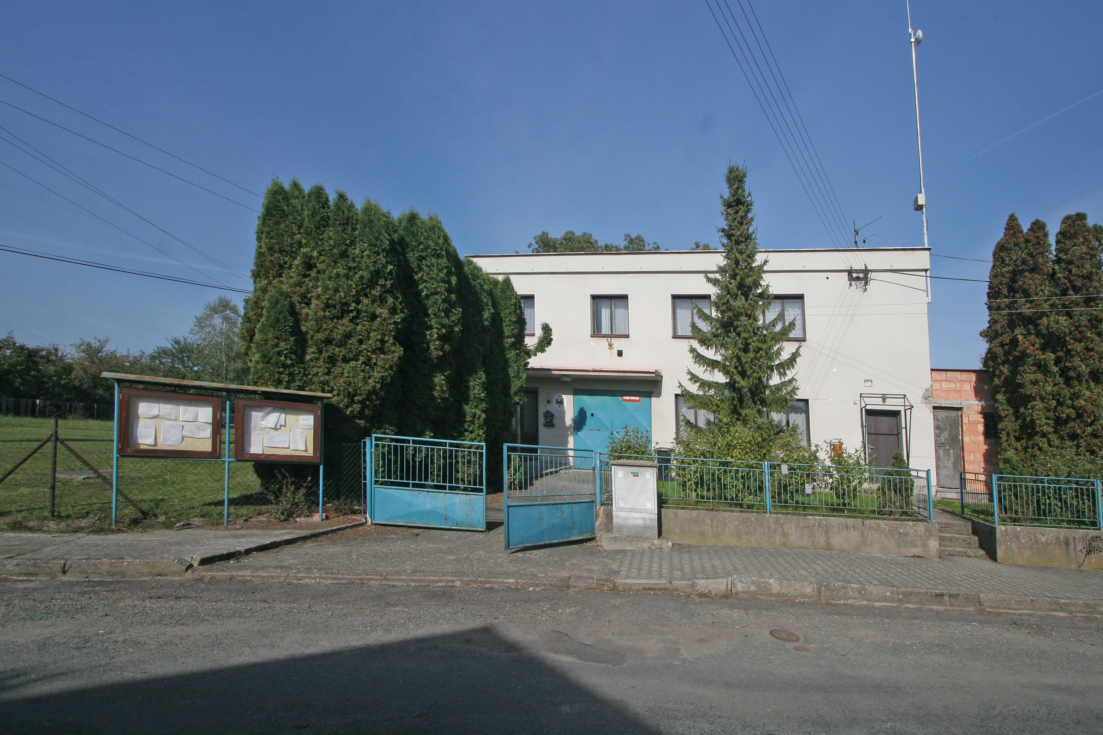 Poběžovice u Přelouče obecní úřad